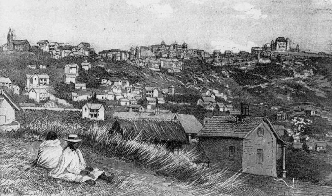 Antananarivo rond 1860